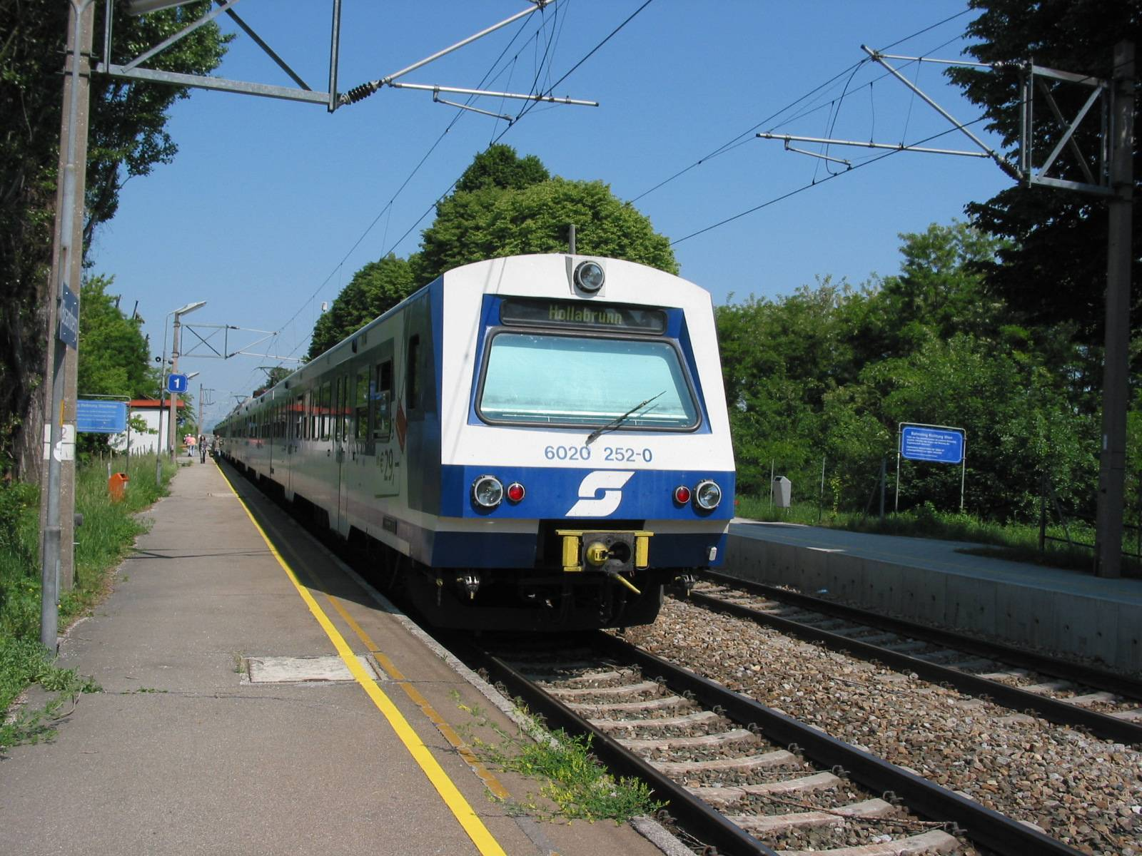 de: Haltestelle Bisamberg 4020 252-0 en: Station Bisamberg 4020 252-0 EMU